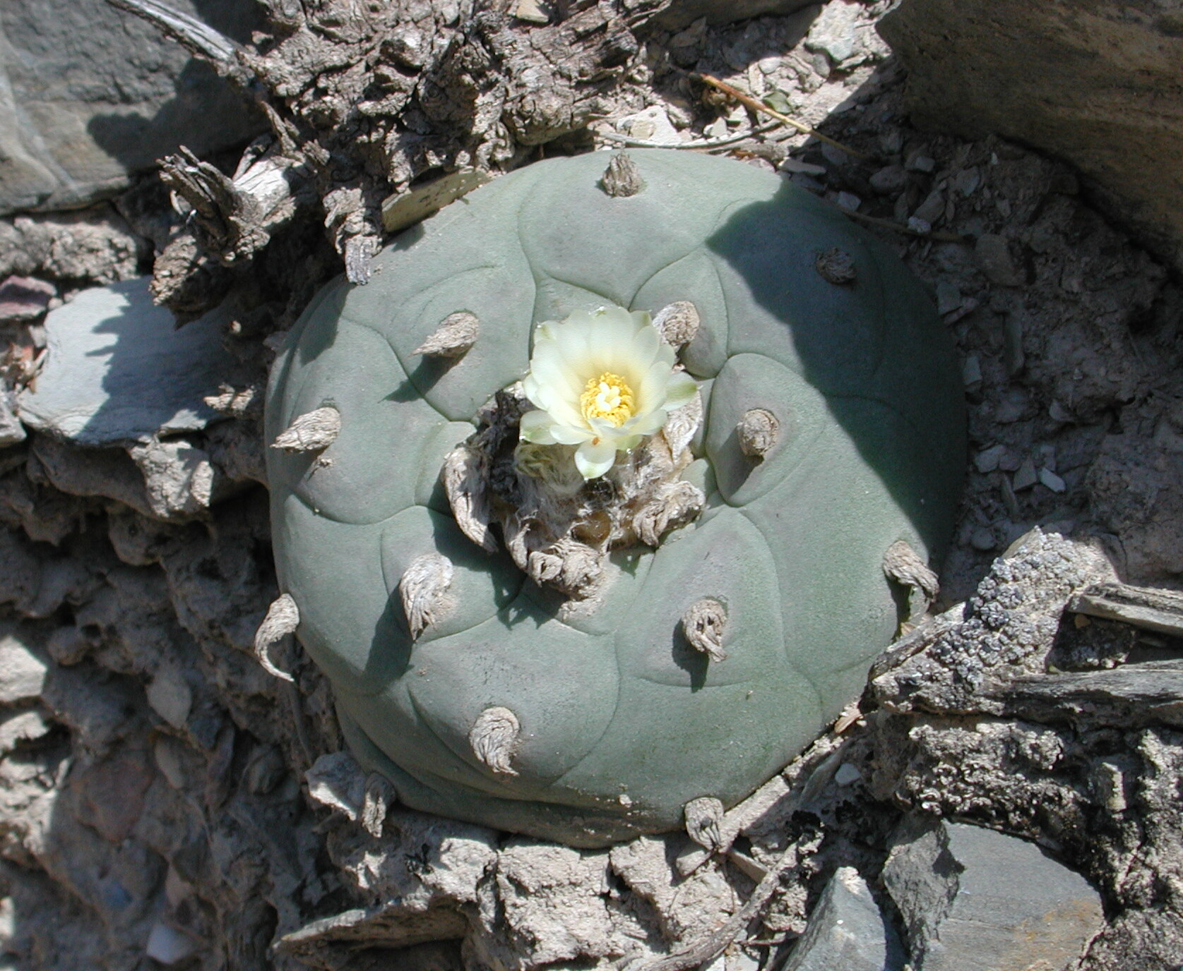 Lophophora diffusa Lophophora diffusa, near Vizarron, Quéretaro, Mexico. Own work.